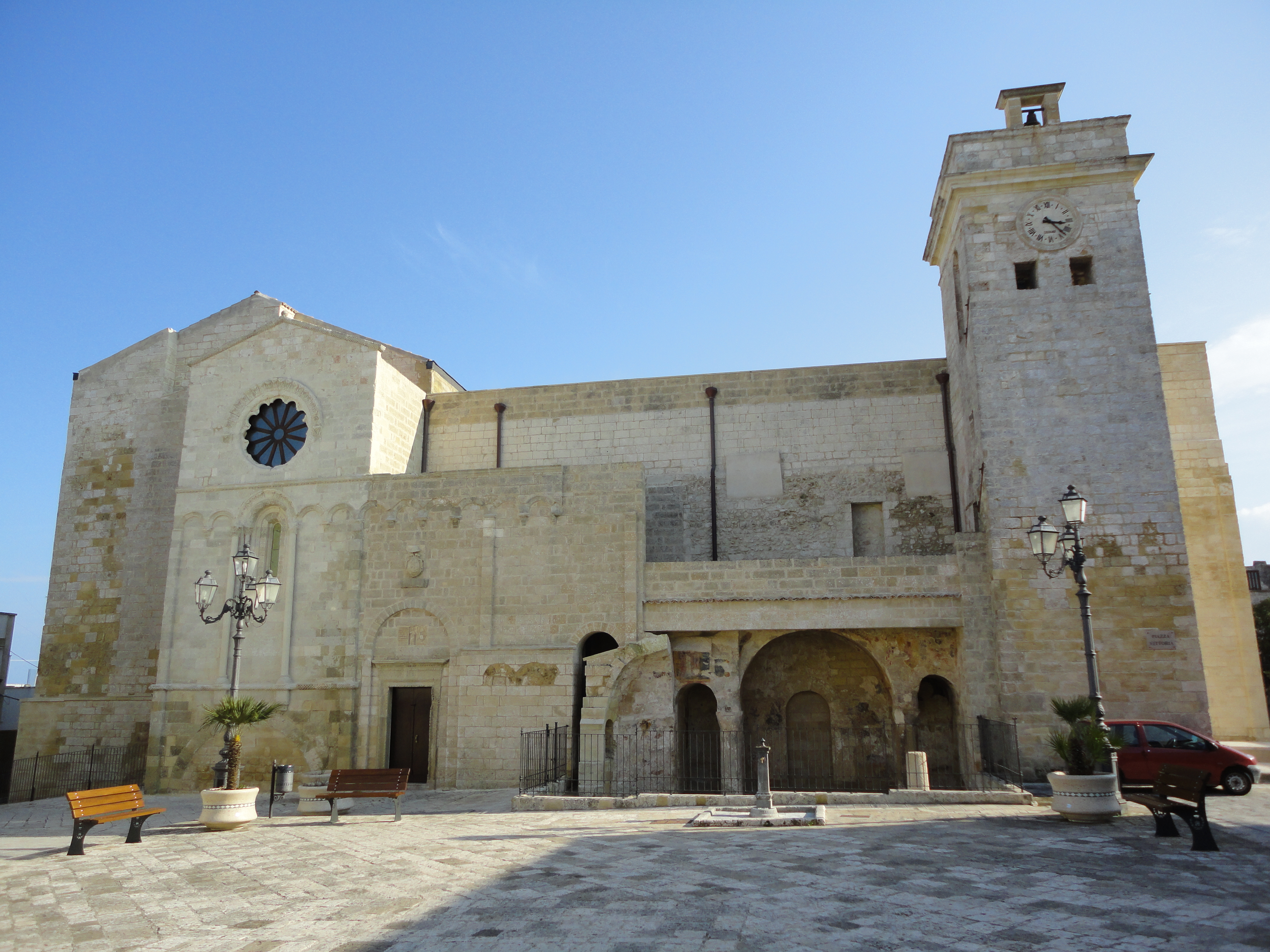 Prospetto laterale Concattedrale di Castro, Lecce